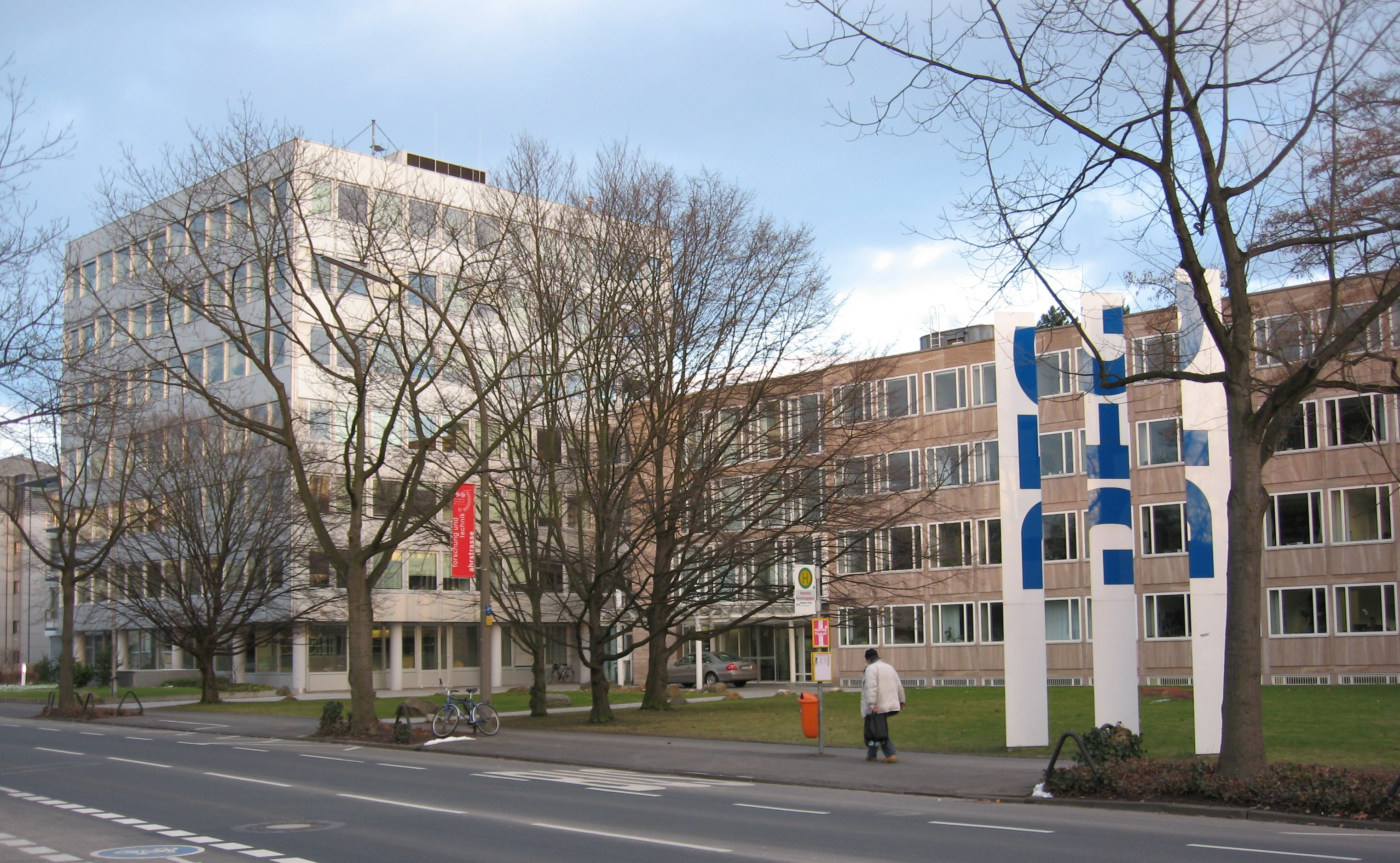 Geschäftsstelle der Deutschen Forschungsgemeinschaft (DFG), Kennedyallee, Plittersdorf, Bonn